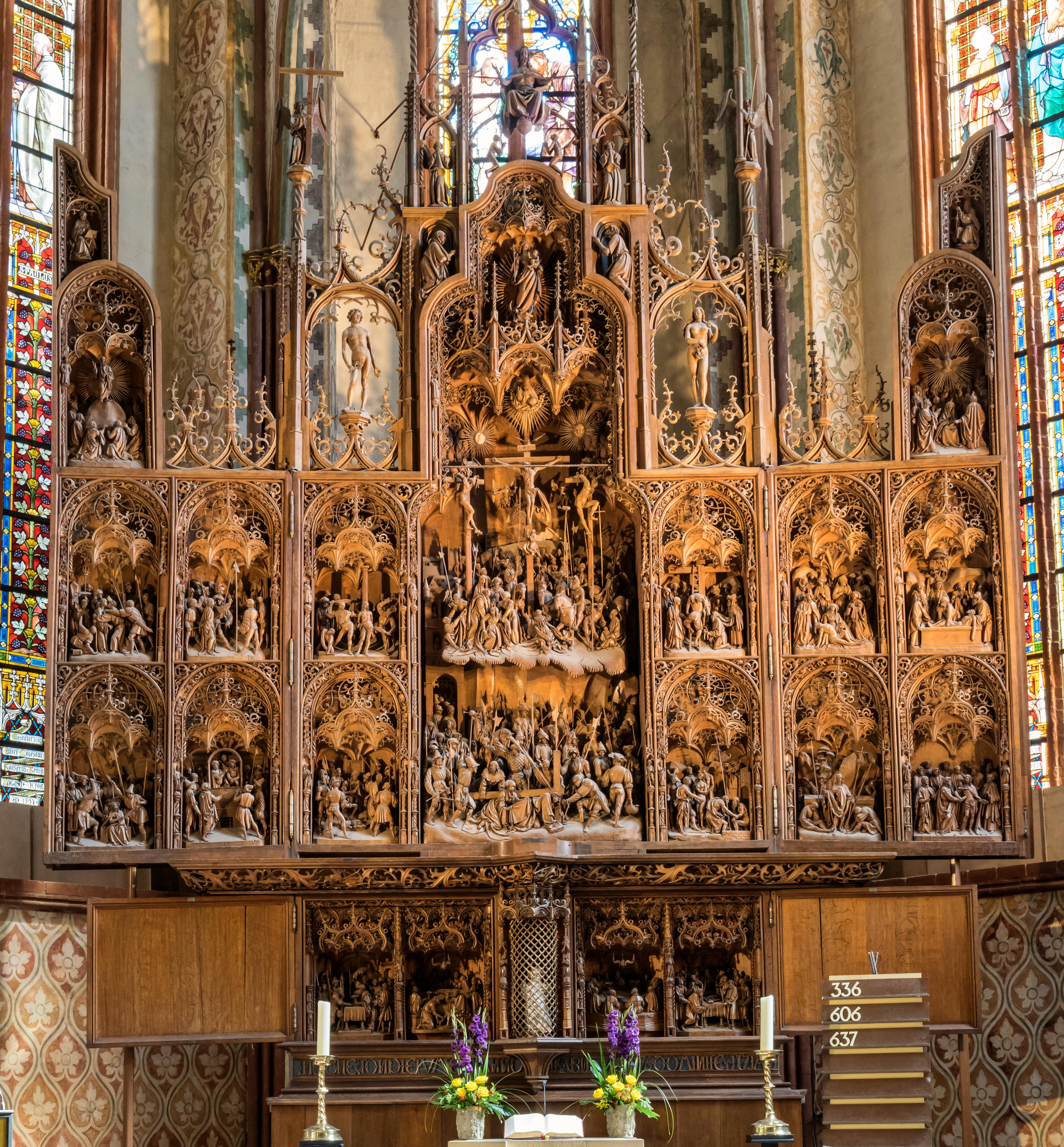 Bilder aus Schleswig Hier der Brüggemann oder Bordesholmer Altar. Gesamt und in Details. Aus der Wikipedia: Der von Hans Brüggemann von 1514 bis 1521 aus Eichenholz gefertigte Altar ist 12,60 Meter hoch und schildert (nach Holzschnitten aus Dürers Kleiner Passion) mit 392 Figuren die biblische Passionsgeschichte von der Gefangennahme Jesu bis zu Christi Himmelfahrt. Im Mittelfeld sind Kreuztragung und Höllenfahrt durch größere Formate hervorgehoben. Himmelfahrt und Pfingsten werden auf den Seitenflügeln abgebildet. Neben dem hochgezogenen Mittelteil sind Adam und Eva dargestellt. Über allem schwebt Christus als Pantokrator.